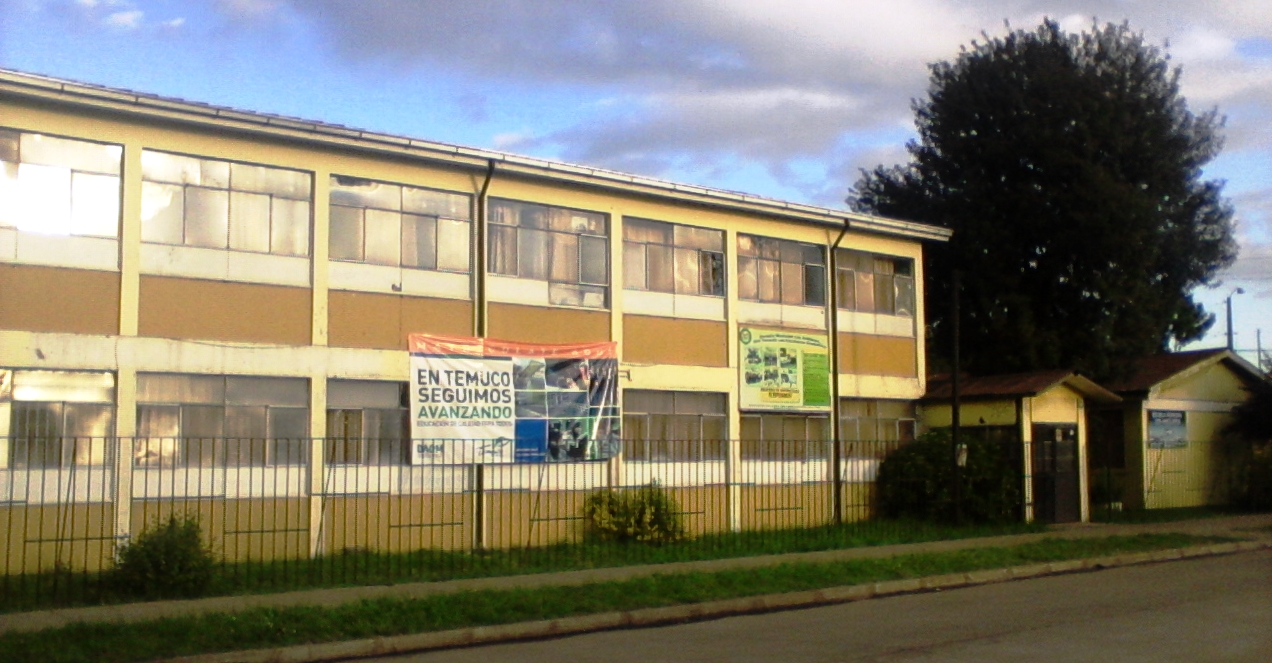 Escuela Municipal Los Avellanos de Temuco, Chile.